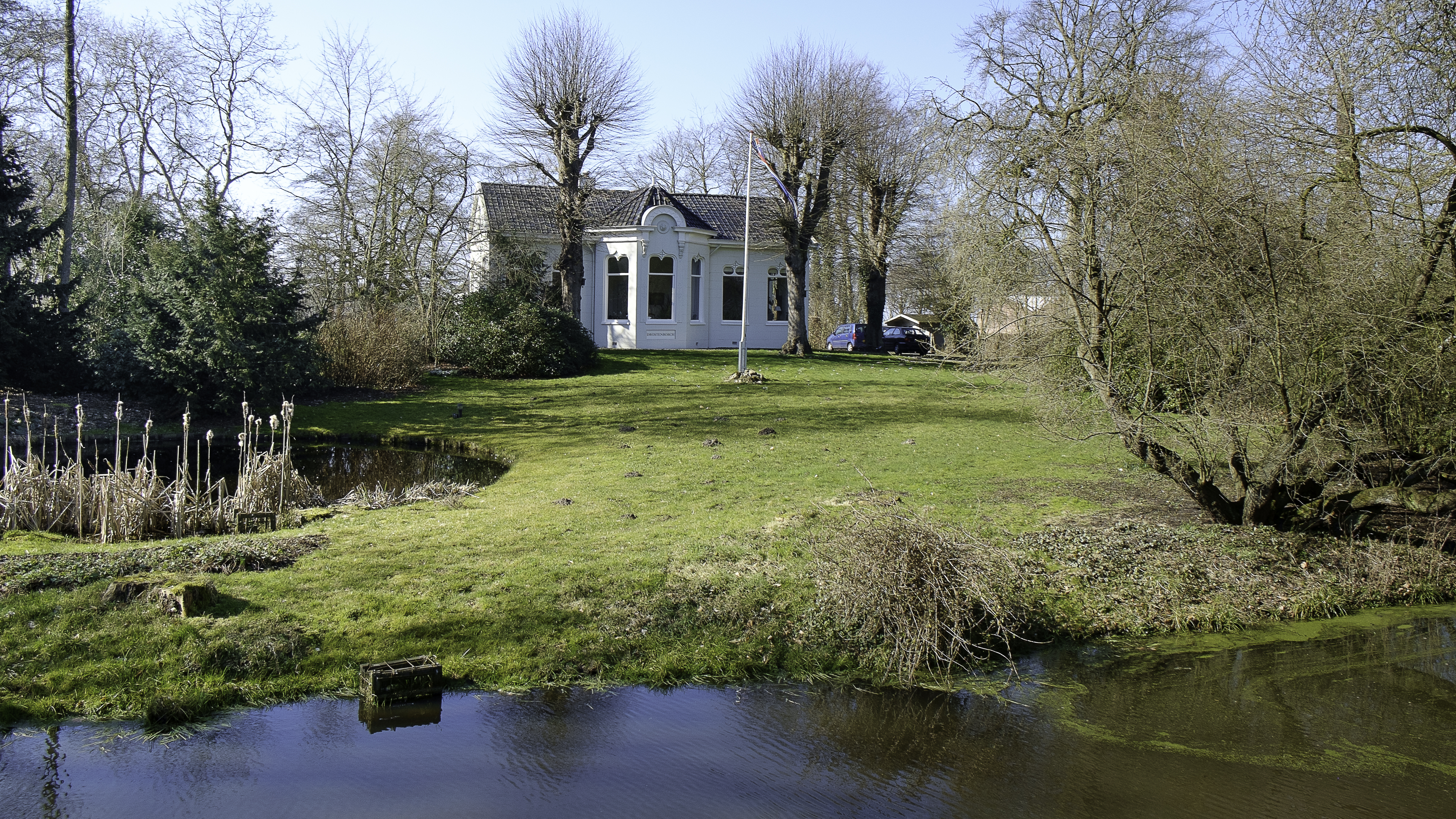 Villa Drostenborgh aan de Uiterburen in Zuidbroek